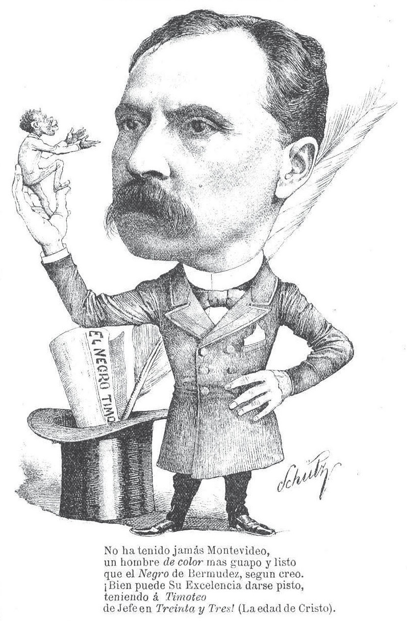 Caricatura de Washington P. Bermúdez por Charles Schütz